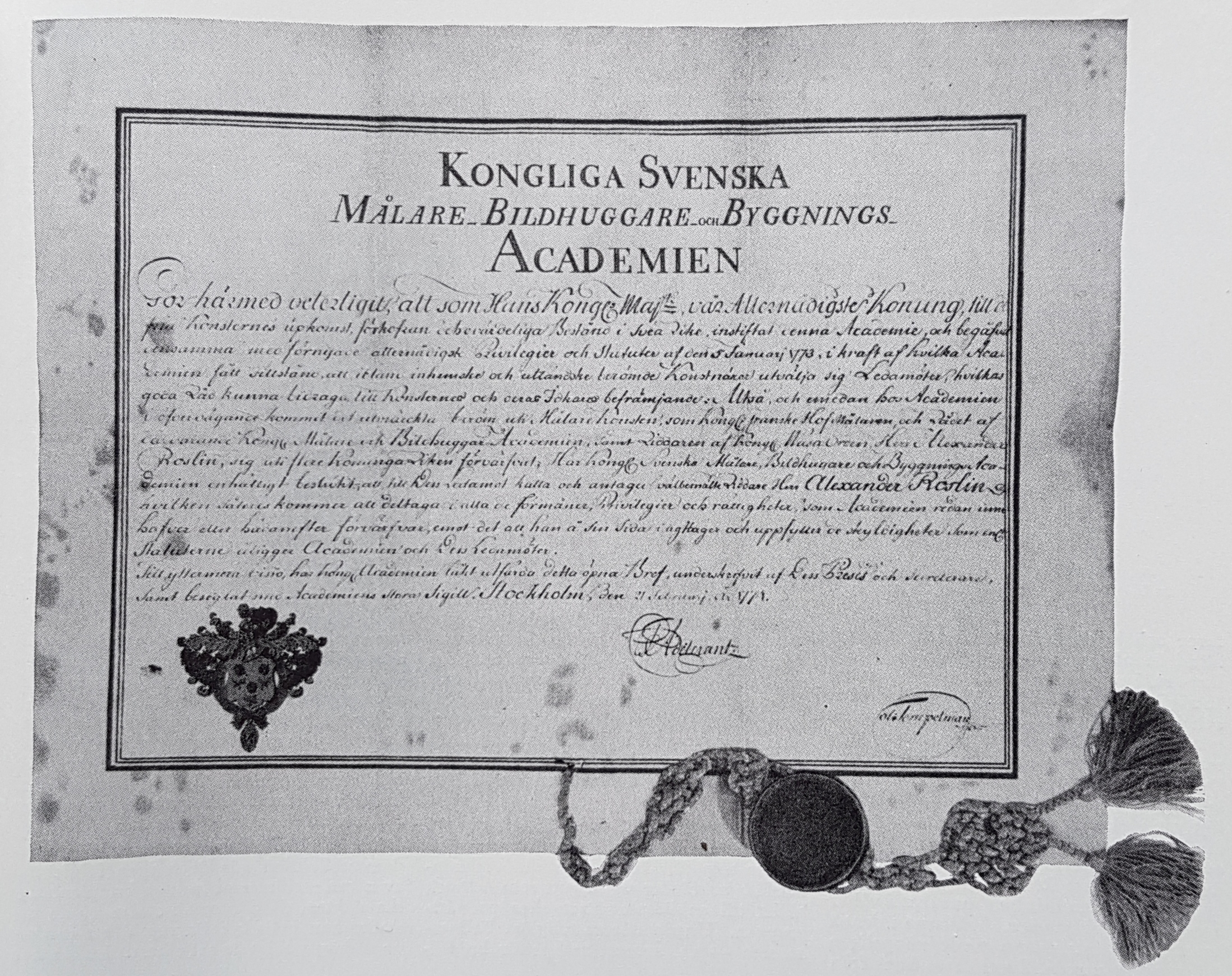 Alexander Roslin kallas till Konstakademien Pergamentbrev daterat Stockholm den 21 februari 1774, kallande Alexander Roslin till ledamot av "Kungliga Svenska Målare- Bilhuggare- och Byggnings-Academien", undertecknat av C.F. Adelcrantz och Olof Tempelman. Till detta dokument har Roslin fogat sitt vapen med tre rosor och Vasa-orden, akademiens sigill i förgylld kapsel och blågula silkessnören. Avfotograferad bild från Allhems Svenskt konstnärslexikon.